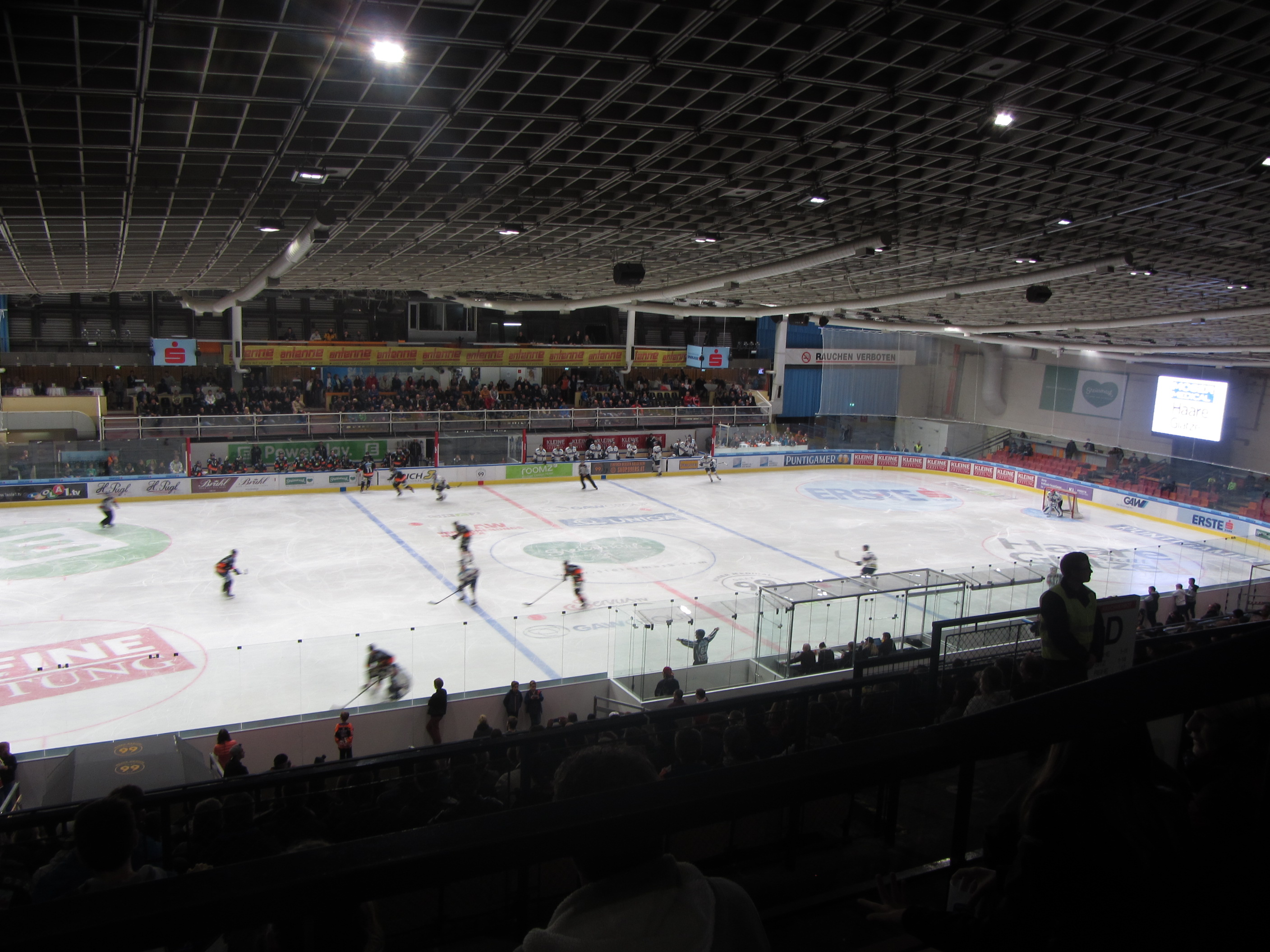 Liebenauer Eisalle vor dem Umbau